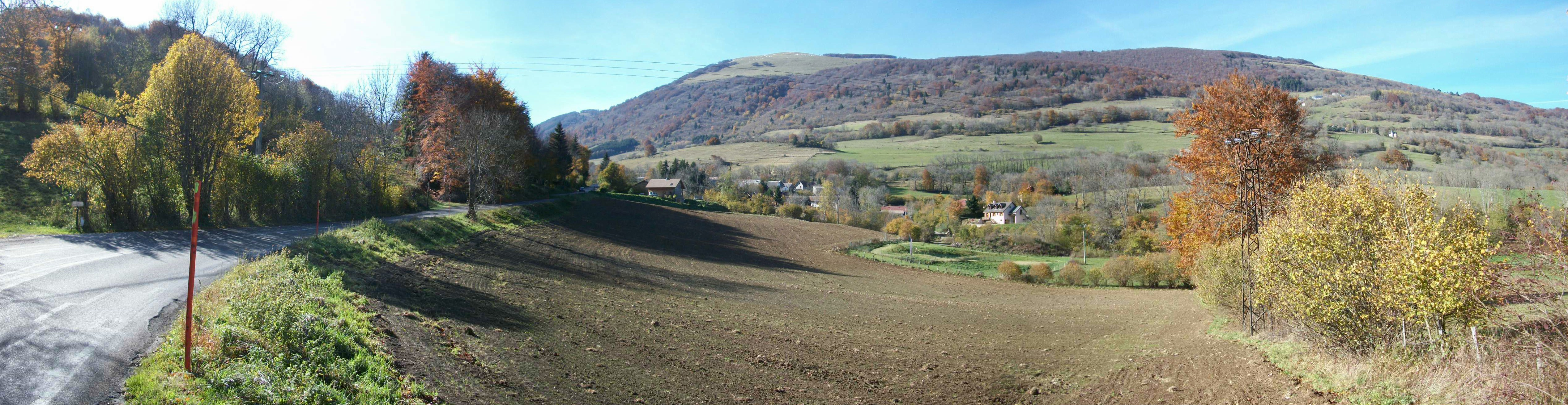 Vue panoramique du hameau des Pras